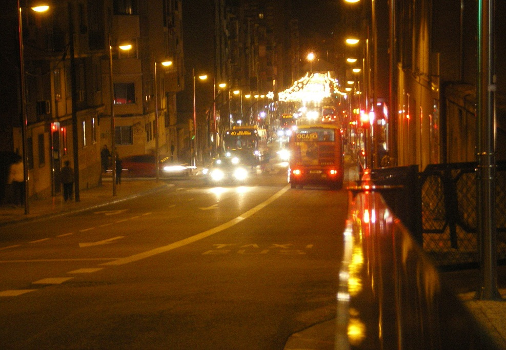 Fotografía de la Avenida de San José en la ciudad de Zaragoza (España).